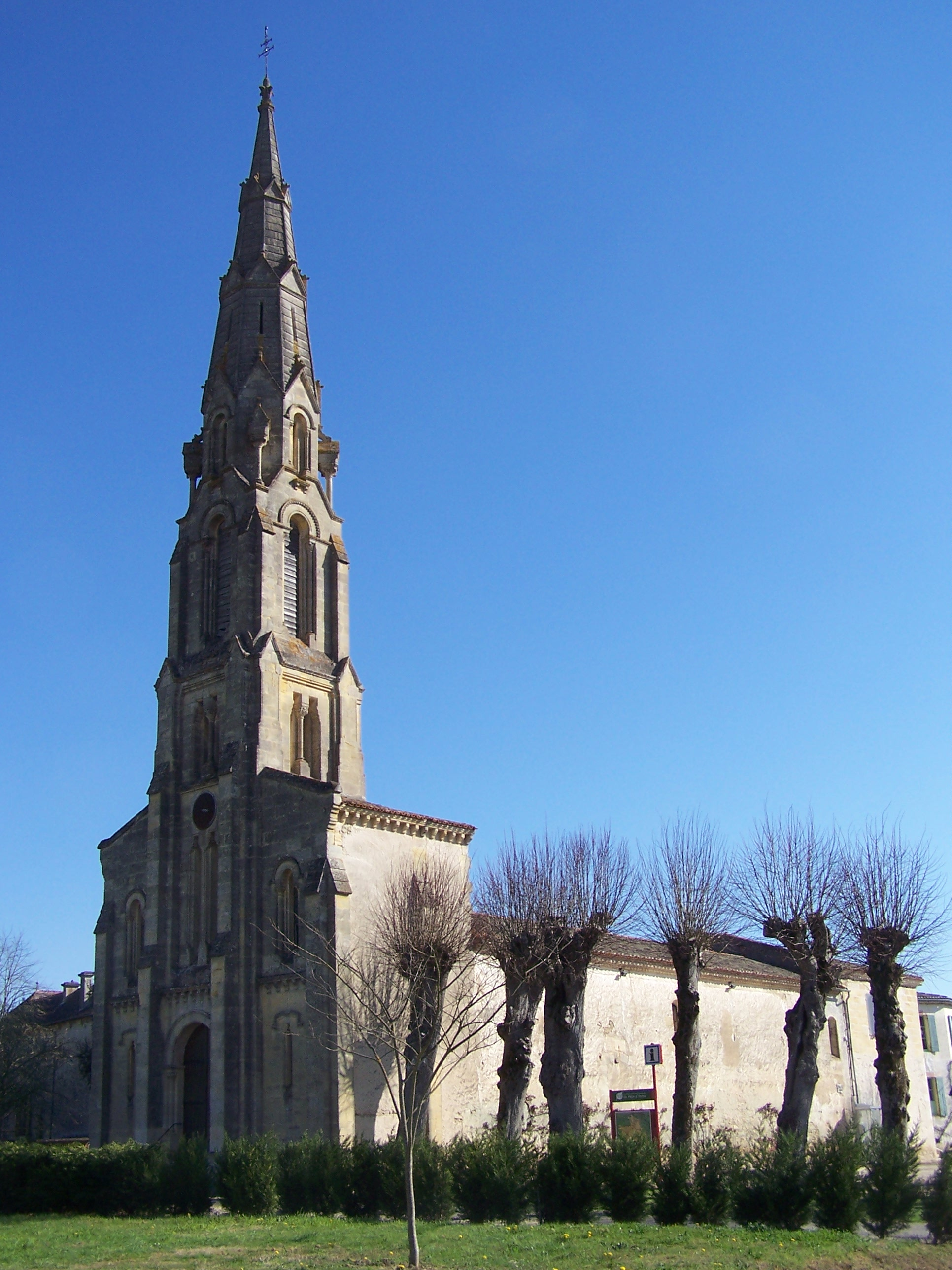 Église de Barie, Gironde, France